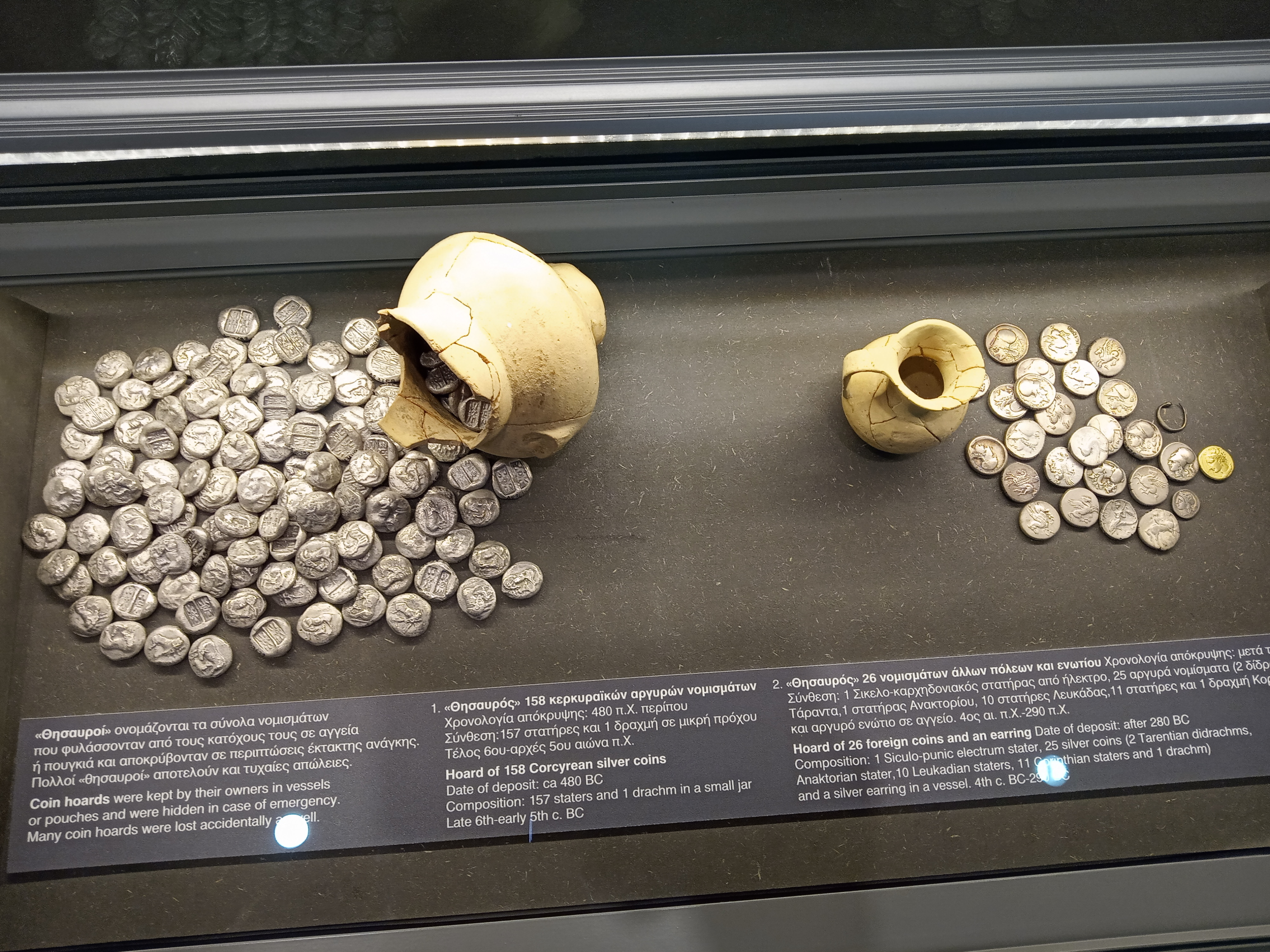 Археологічний музей Керкіри, греція, острів Керкіра